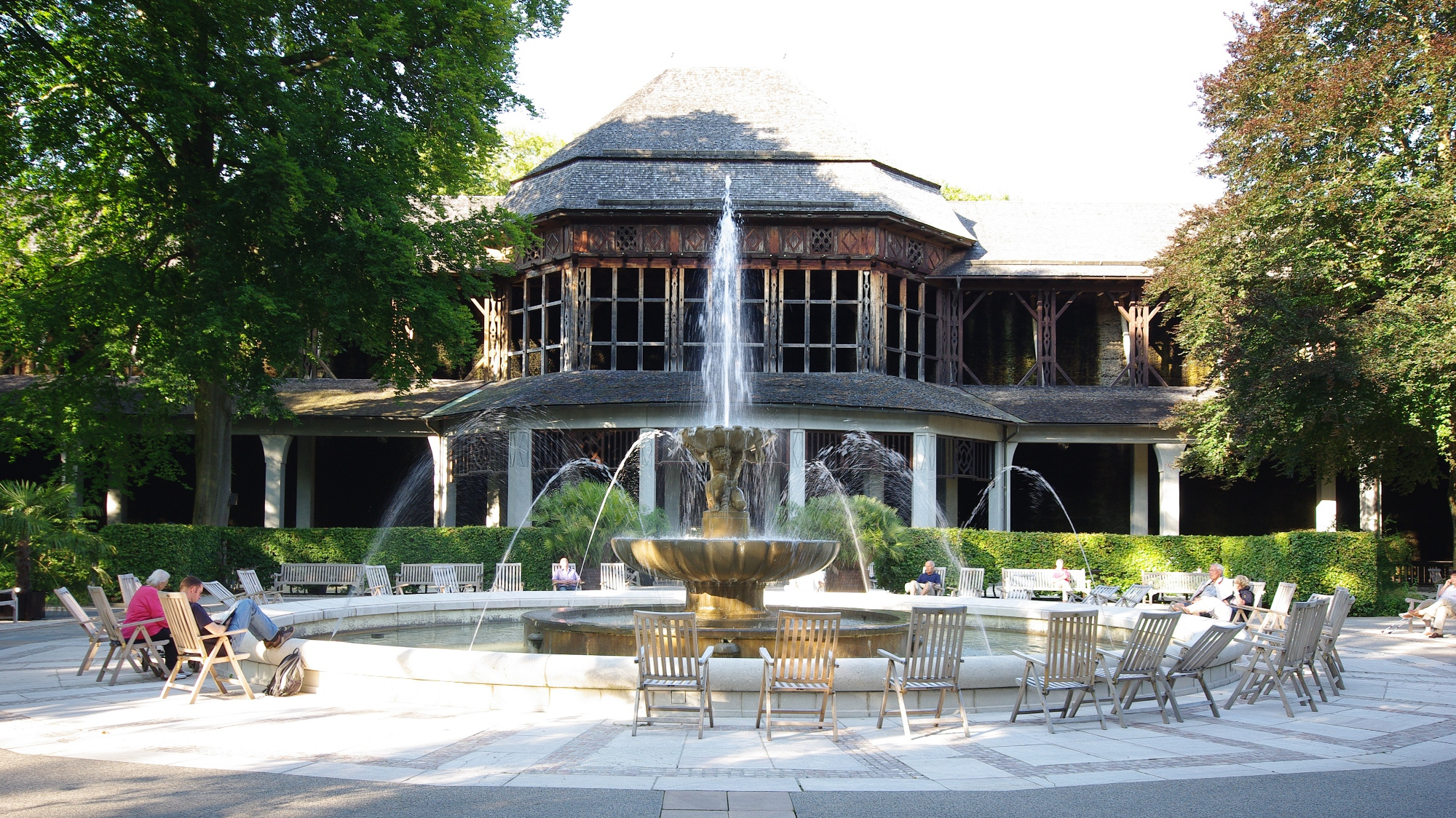 Kurstr. 6, 83435 Bad Reichenhall, Brunnen im Kurgarten, im Hintergrund das GradierhausThis is a photograph of an architectural monument.